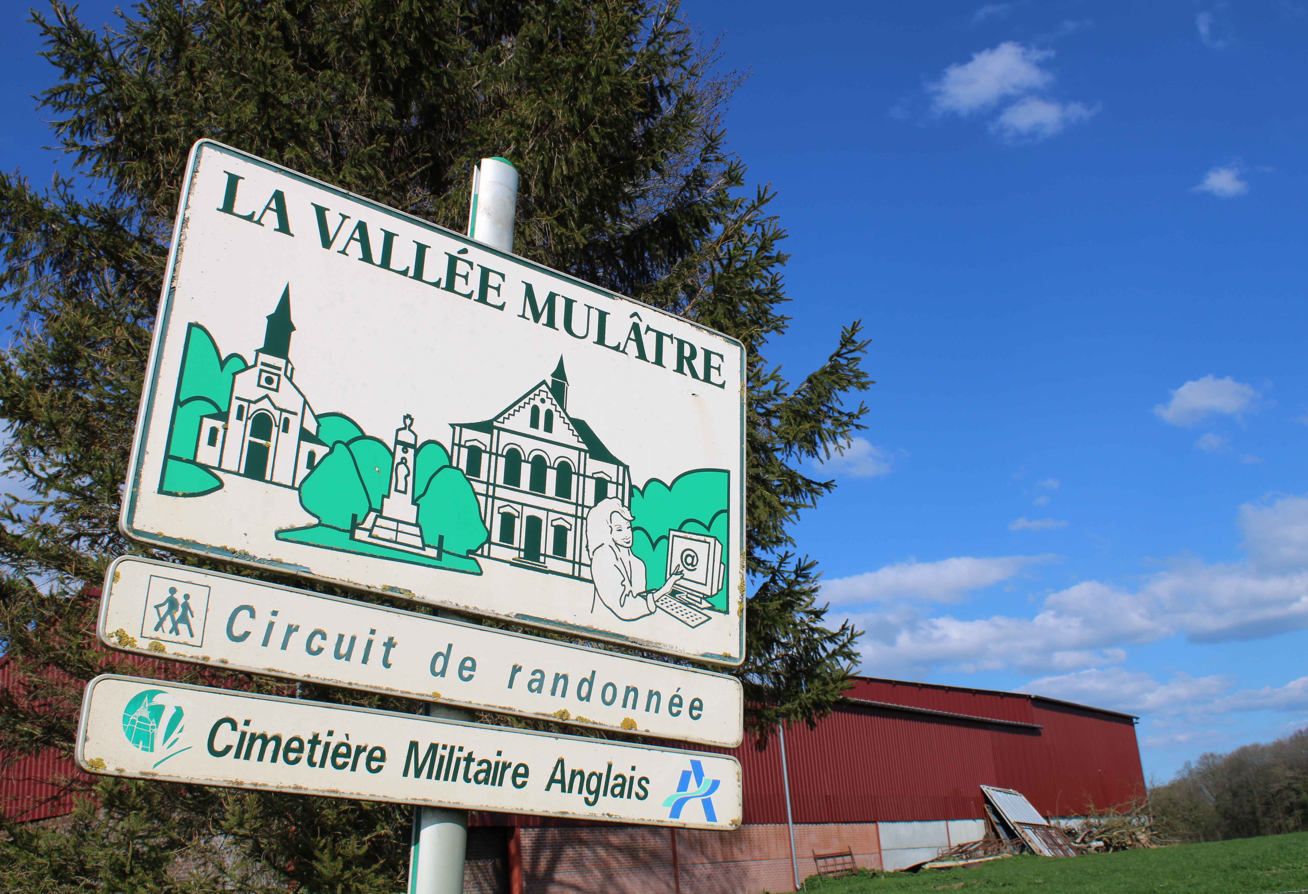 Panneau touristique.